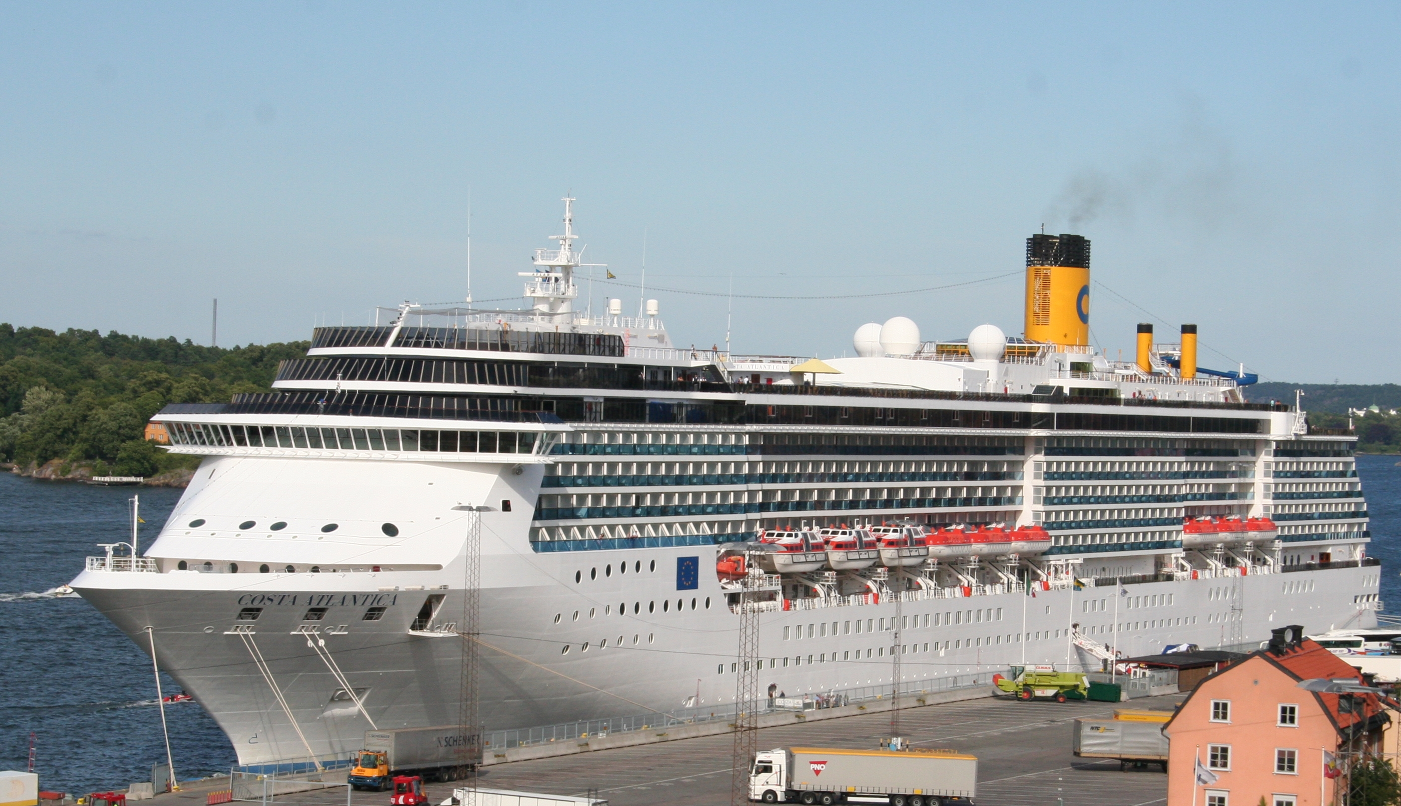 Kryssningsfartyget M/S Costa Atlantica i Masthamnen i Stockholm. Källa: eget foto, fotograf EnDumEn, 26 juli 2007